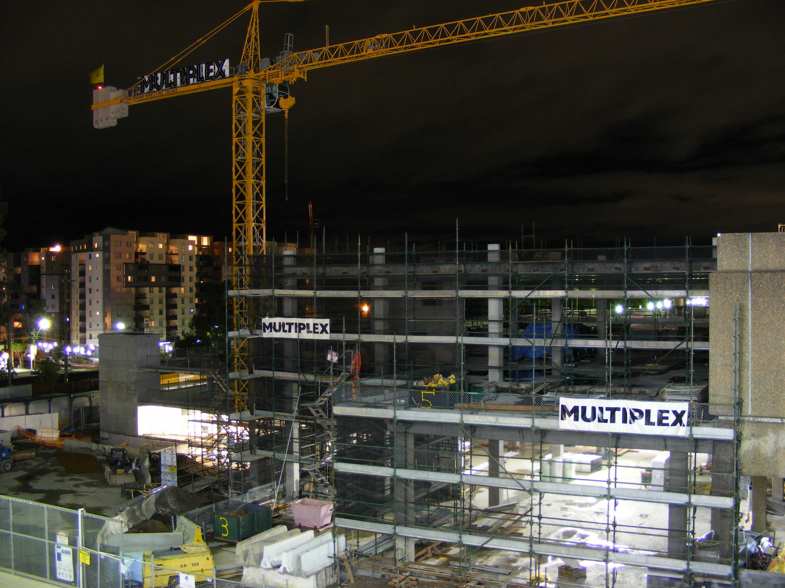 CENTRO EXTENSION